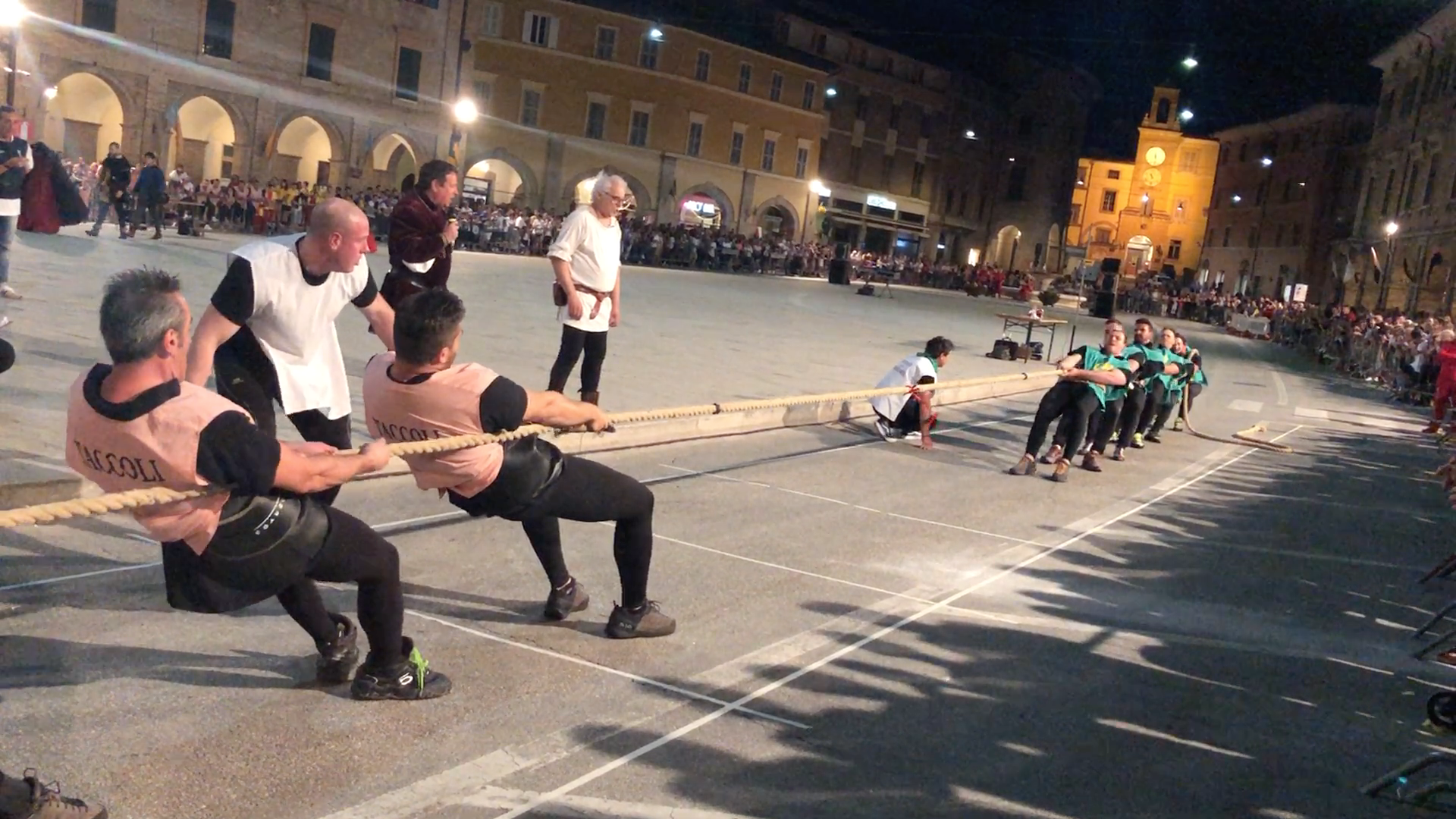 Tiro alla fune durante il Palio dei Castelli di San Severino Marche nel 2019